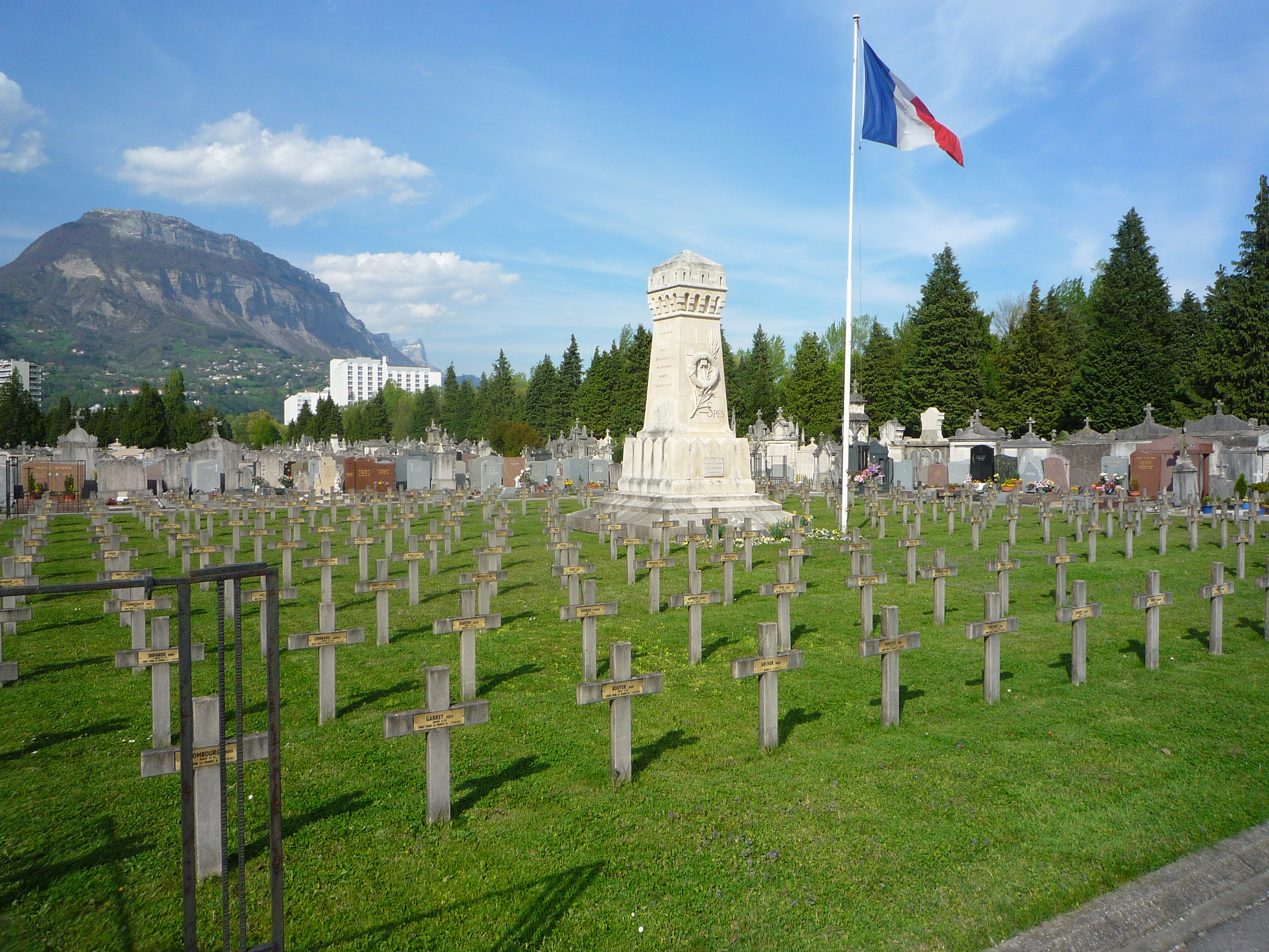 Carré militaire 14-18 de la garnison de Grenoble avec son monument dédié à l'association du souvenir français. Cimetière Saint-Roch de Grenoble.